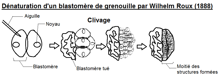 Schéma de l’expérience de dénaturation de blastomère par Wilhelm Roux (1888) reproduit sur Microsoft Paint.